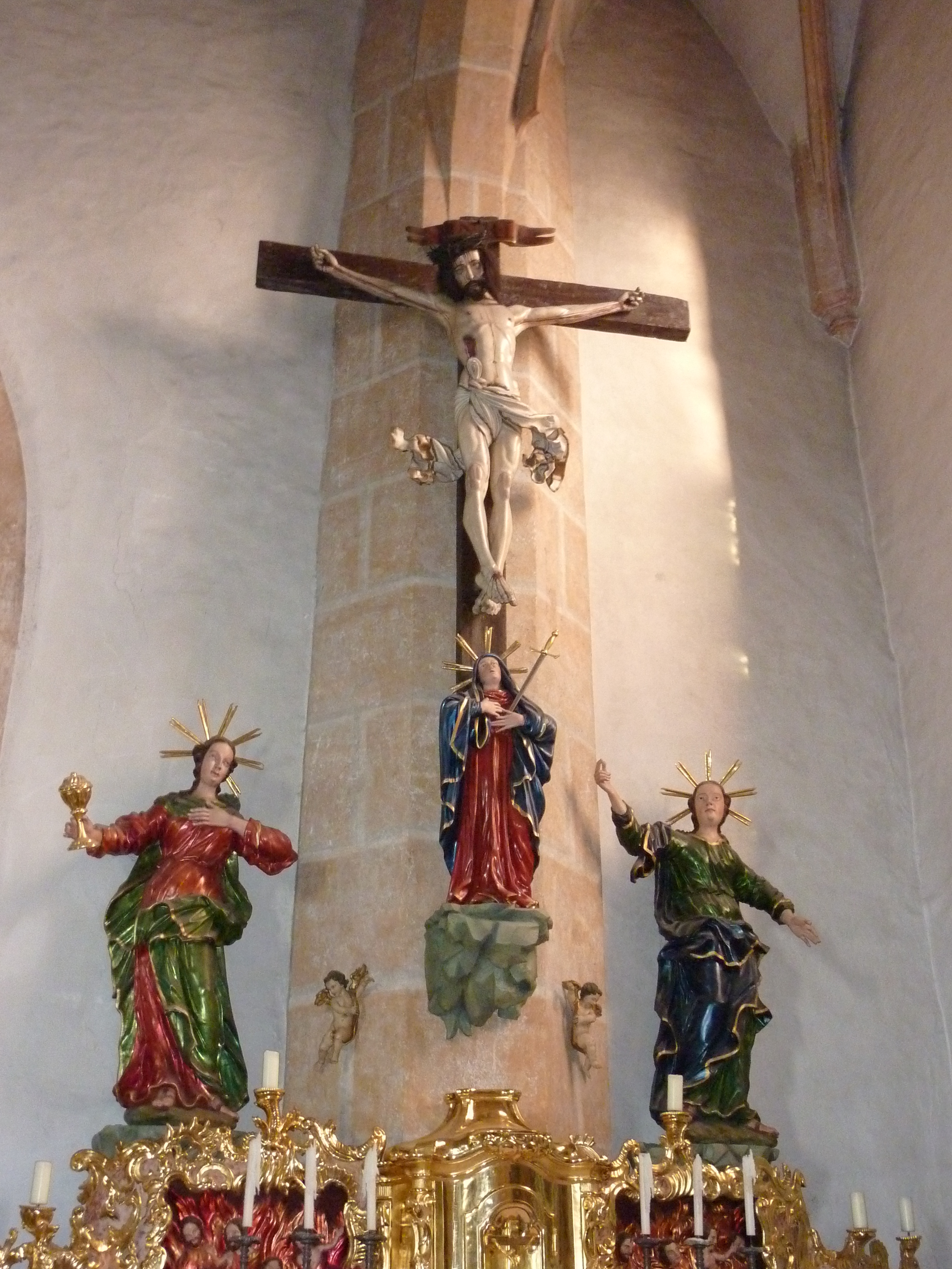 Pfarrkirche St. Veit an der Gölsen, Niederösterreich - Allerseelenaltar mit spätgot. Kruzifix (zugeschrieben Martin Kriechbaum), Statuen hll. Maria Magdalena u. Johannes Ev.